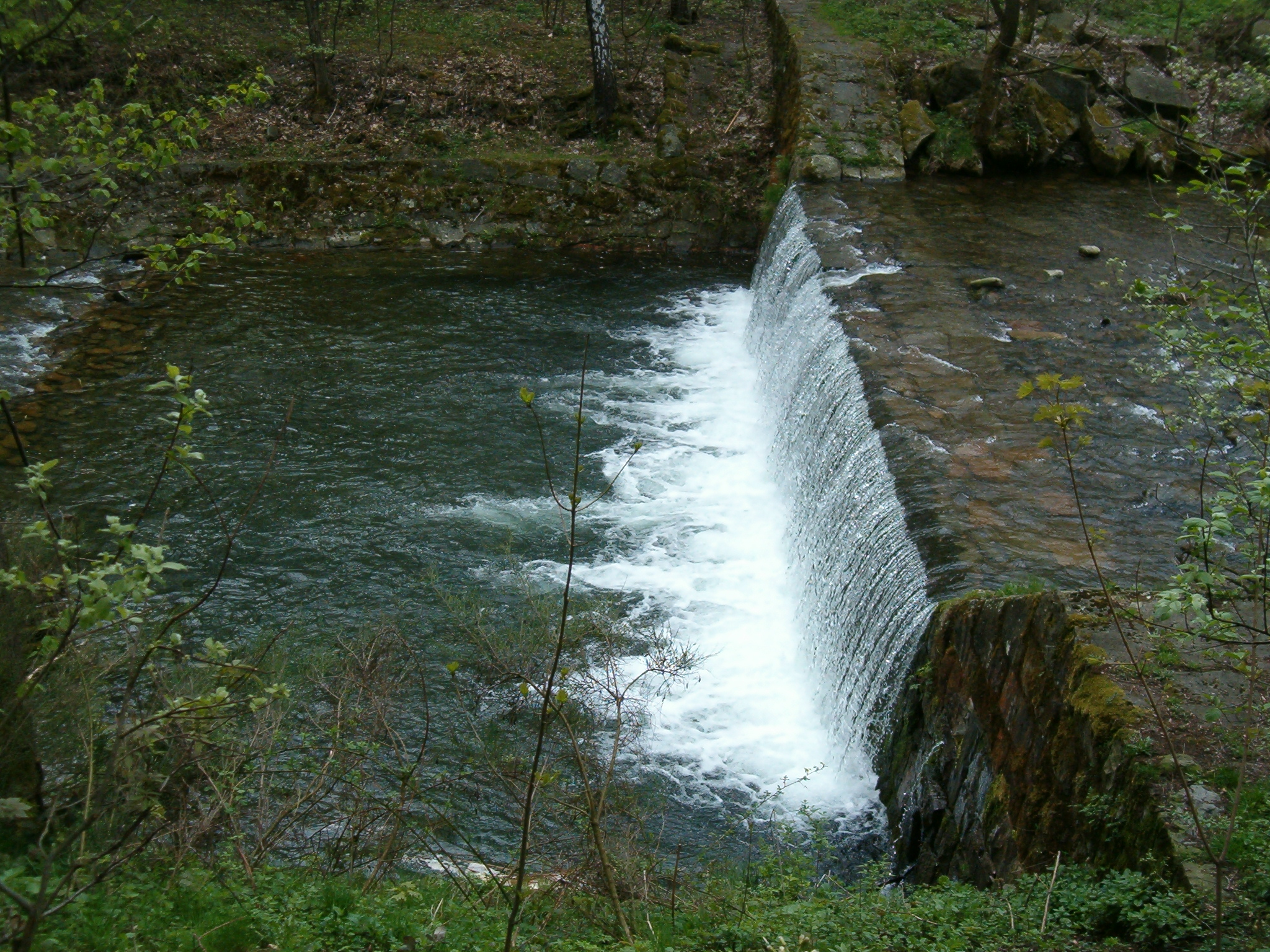 Mohelnice protékající obcí Krásná